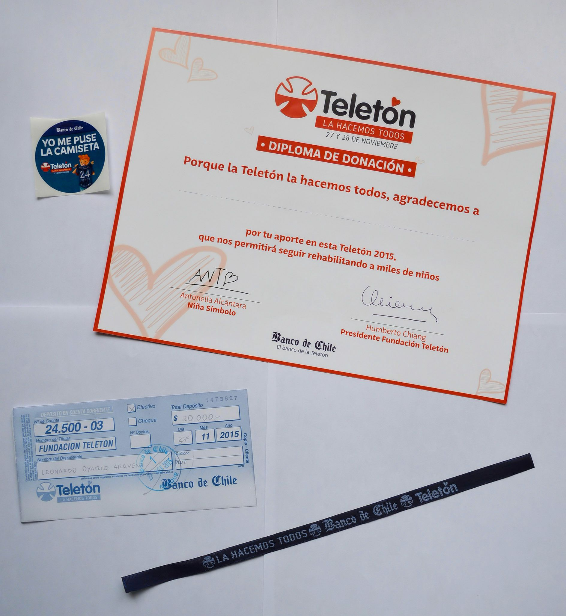 Comprobante de deposito, sticker, pulsera y diploma de donación de Teletón 2015